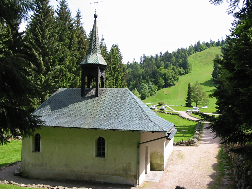 Ermitage Frère Joseph Commune de Ventron, dans le massif des Vosges. Au premier plan, la chapelle construite par l'ermite. Au fond, l'une des pentes aménagées pour le ski alpin. Photo personnelle du 7 juin 2006. Copyright © Christian Amet